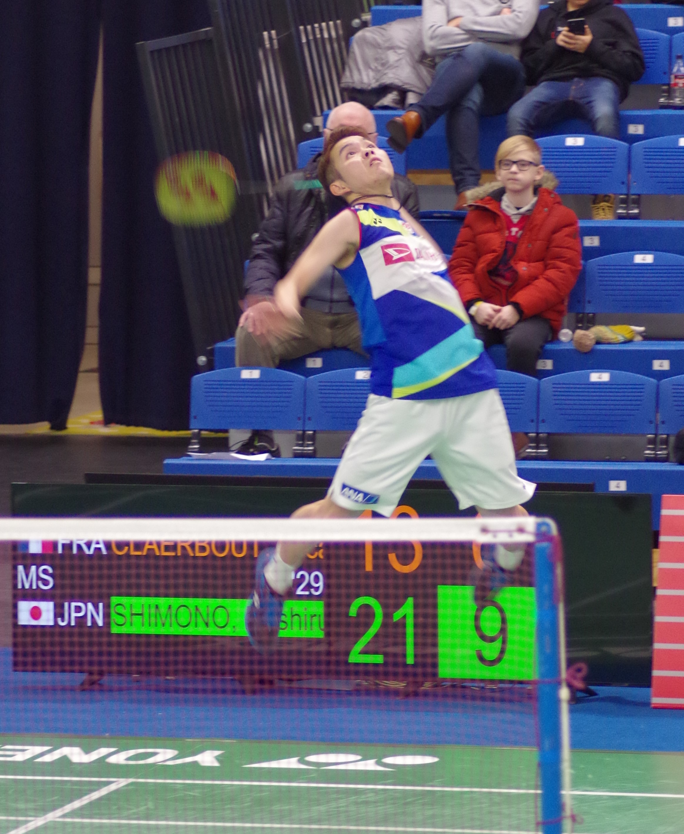 Hashiru Shimono, Jaapani sulgpallur